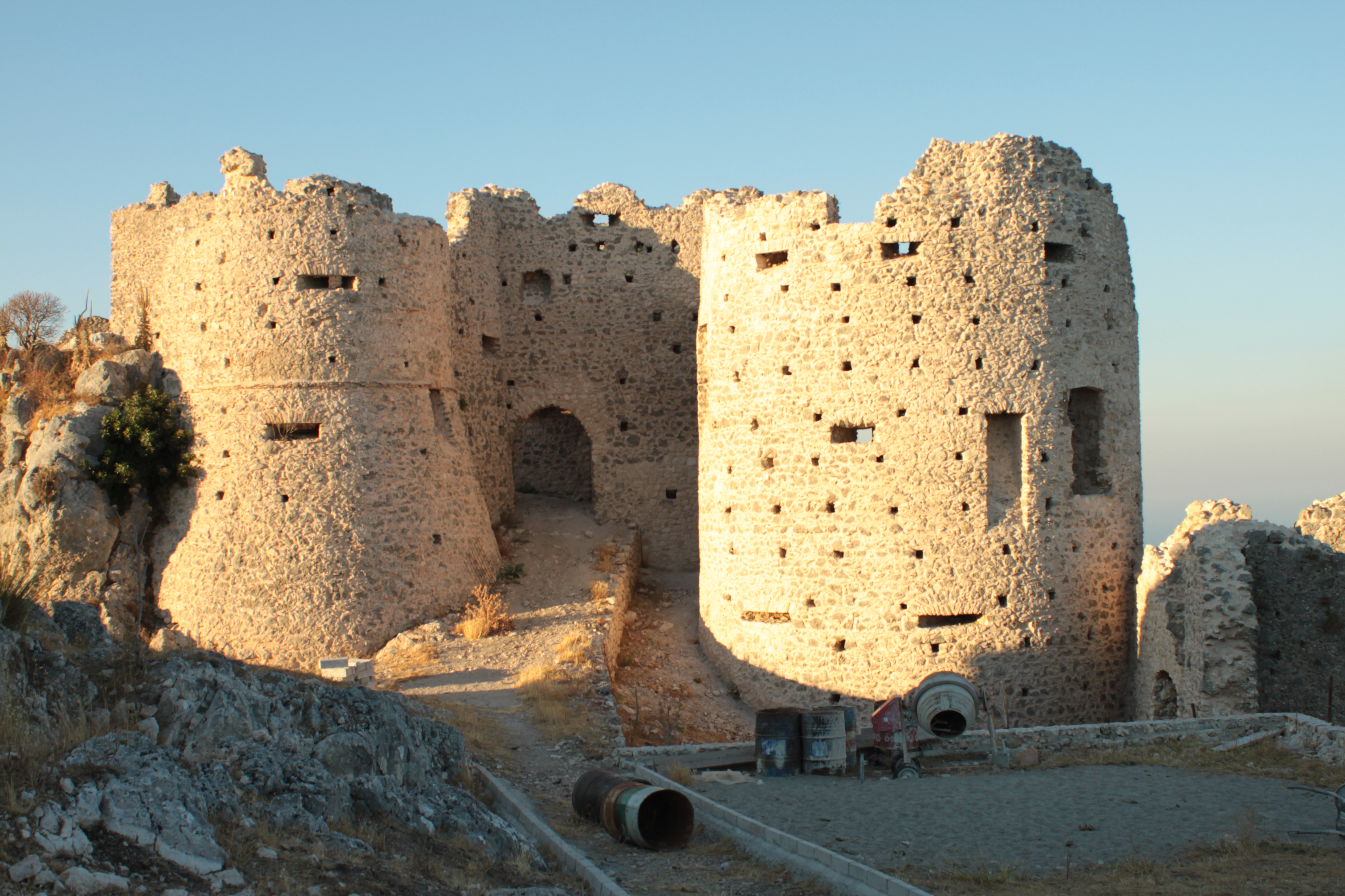 Castello Normanno di Stilo in restauro (agosto 2011)